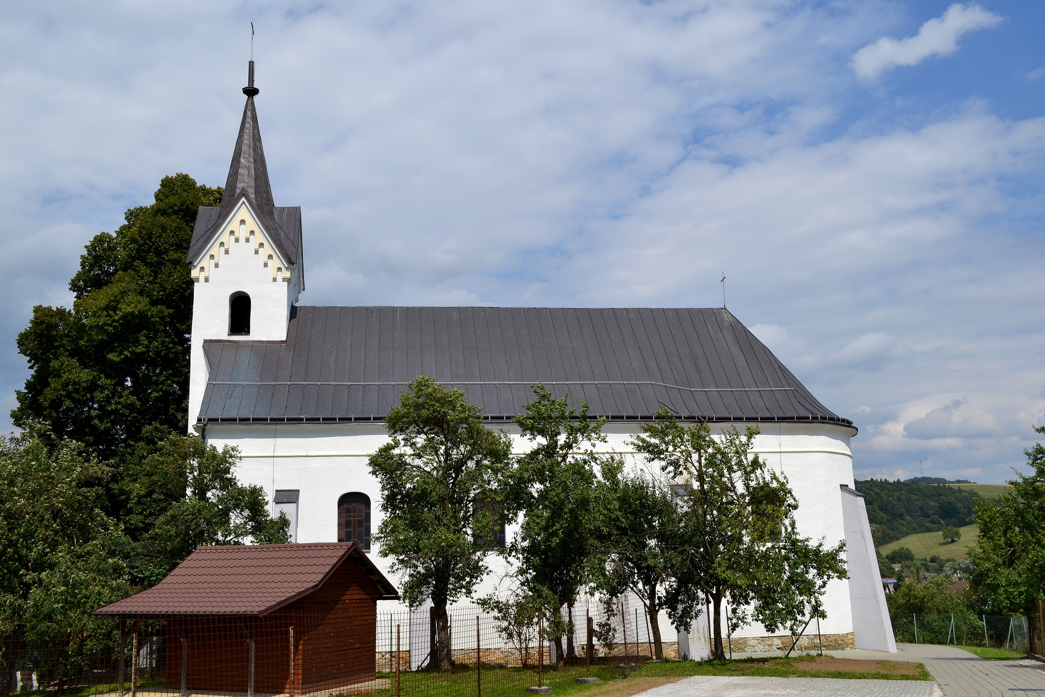 Slopná (okr. Považská Bystrica), Kostol svätého Ondreja; celkový pohľad z juhu